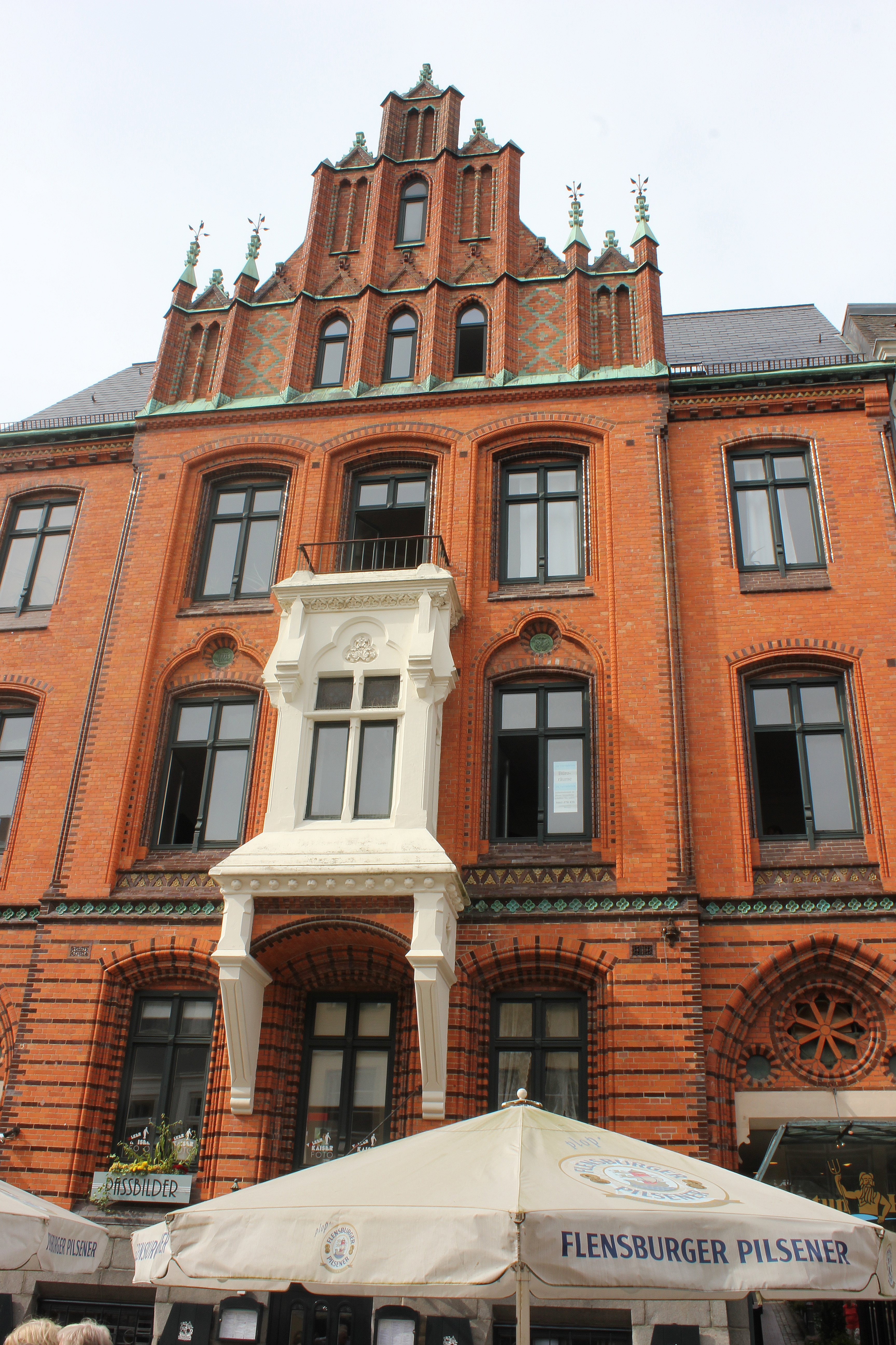 Große Straße 77, Wohn- und Geschäftshaus des Großhandelskaufmannes C. N. Hansen, errichtet vom Architekten Johannes Otzen, Bau der Hannoverschen Backsteingotik; Gebäude mit dem Restaurant Börsenkeller und der angrenzende Neptun-Hof.